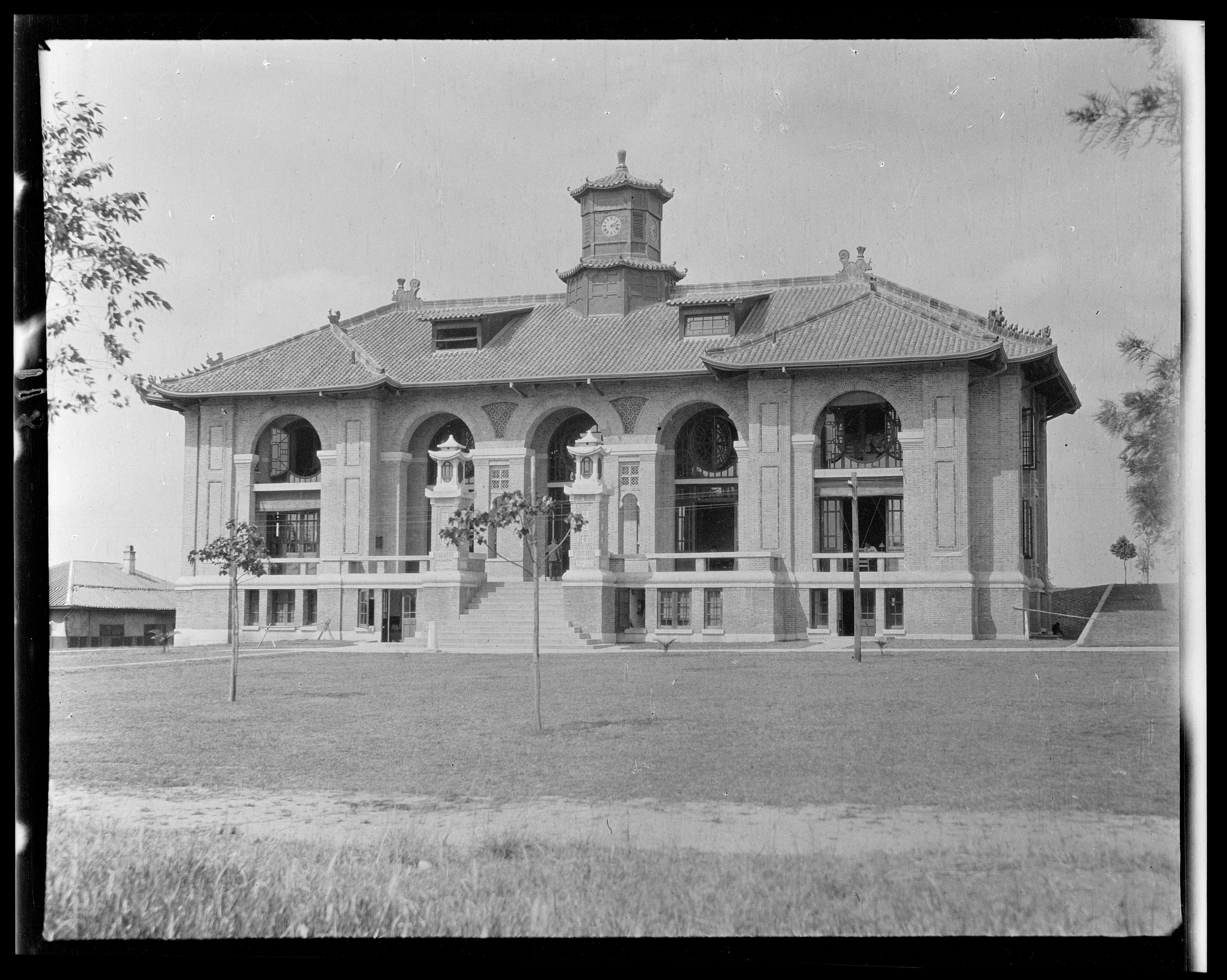 嶺南學校（廣州私立嶺南大學）格蘭堂